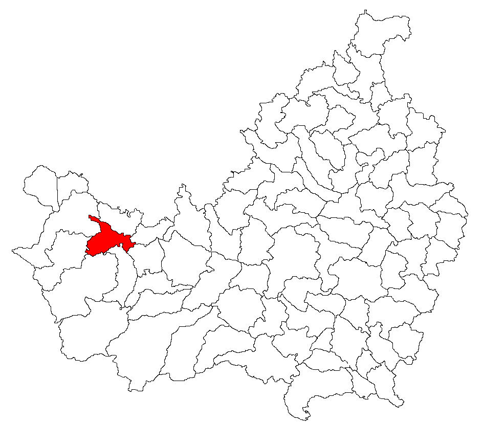 Categorie:Hărţi ale judeţului Cluj